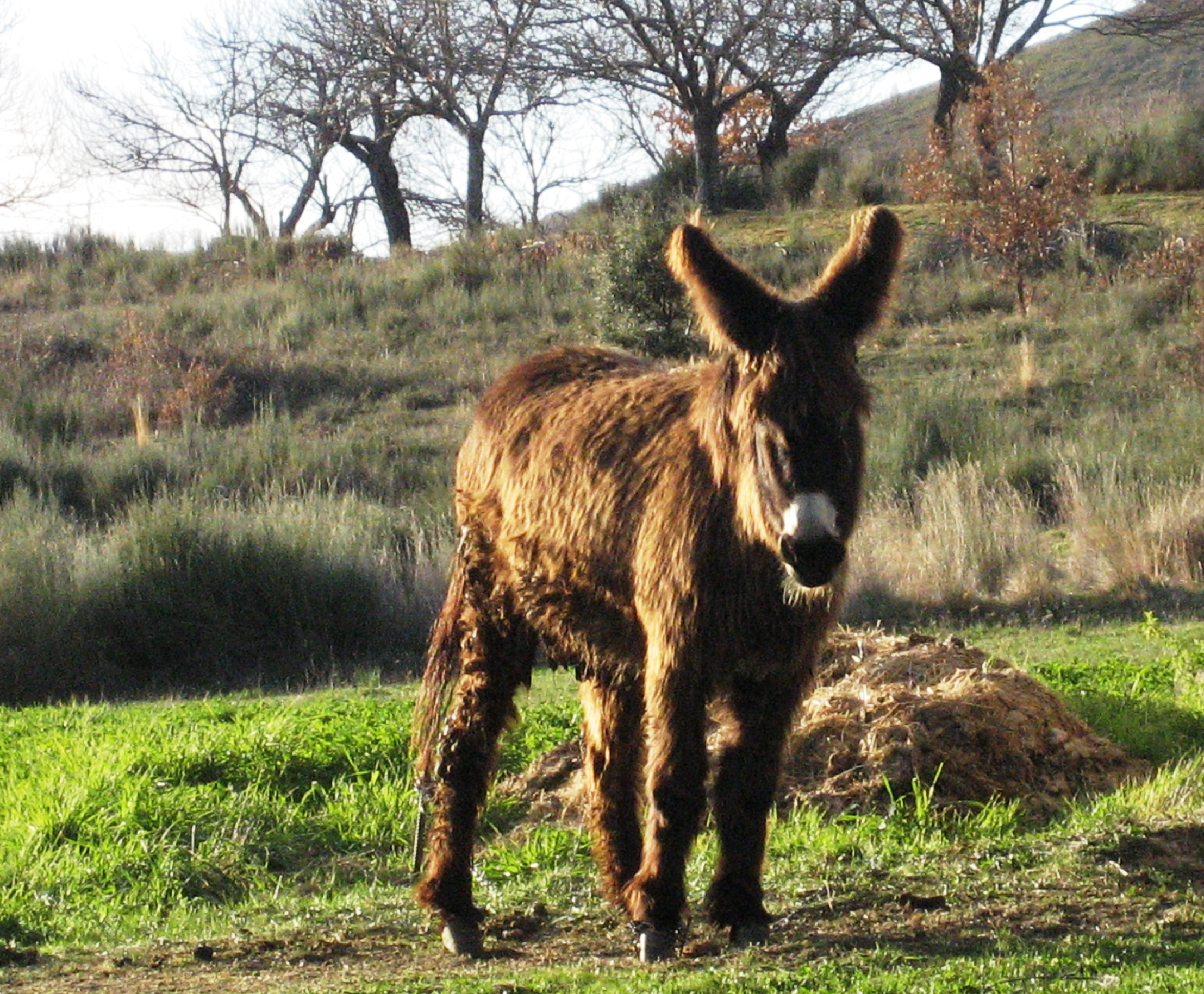 Burro. Imagen tomada en El Bierzo, León, España